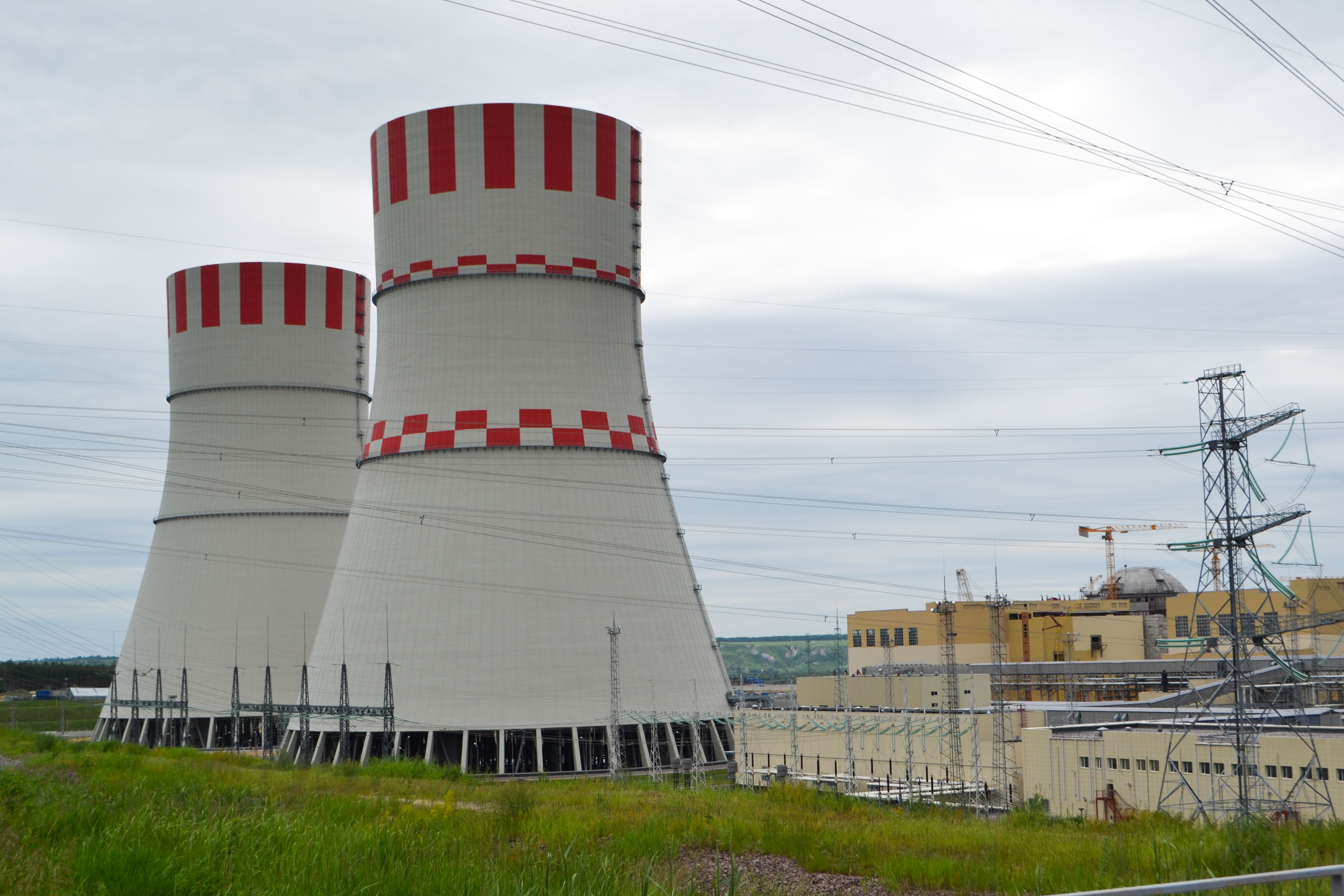 Usina Nuclear Geração III em Novovoronezh